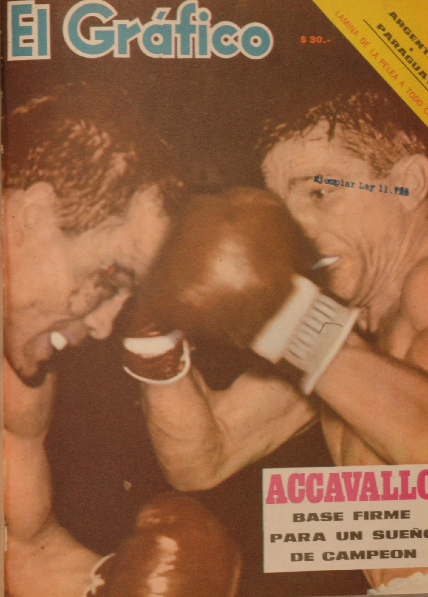 El Grafico del 10 de Agosto de 1965. Edicion 2392